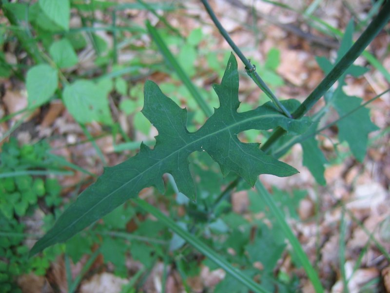 Mauerlattich Mycelis muralis, Müritz-Gebiet